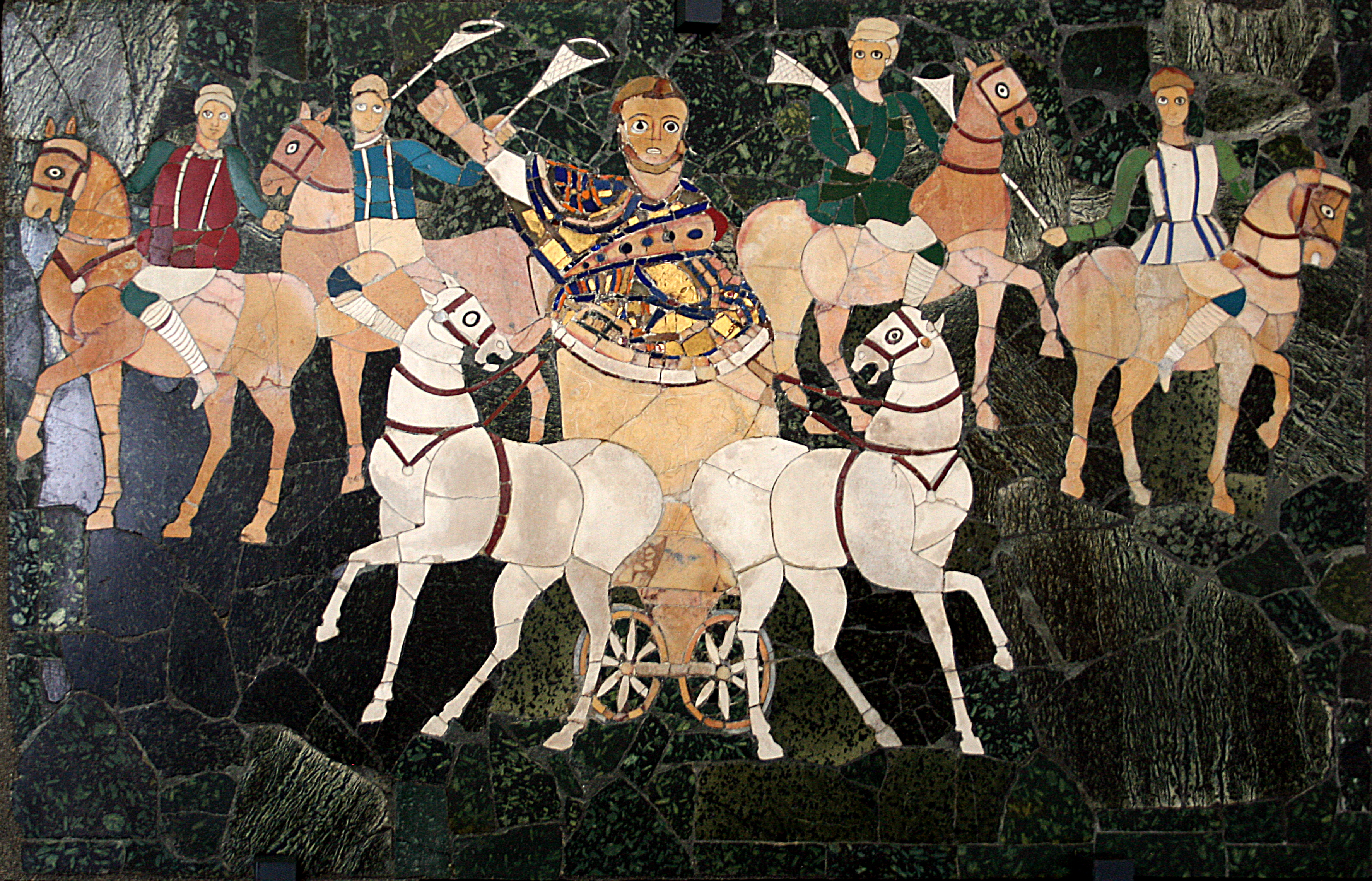 Panneau pariétal en opus sectile représentant une scène du processus consularis. Œuvre romaine de la première moitié du IVe siècle. provenant de la basilique de Junius Bassus, et exposée au Palazzo Massimo alle Terme à Rome (Italie).